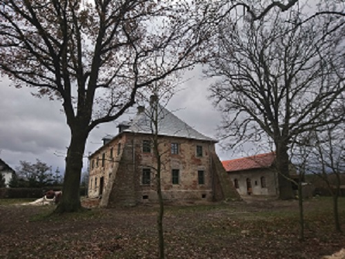 Powstały w 1605 r. budynek dawnej plebani znajduje się w południowej części wsi Broniszów, gm. Kożuchów, pow. nowosolski. obiekt jest orientowany, fasadą zwrocony w kierunku wschodnim. Plebania została zbudowana w stylu późnorenesansowym i przebudowana wielokrotnie, m.in. w XVIII wieku. Budynek wymurowano z kamienia i cegły jako obiekt dwukondygnacyjny, założony na planie prostokąta, z dłuższą osią zbliżoną do osi północ – południe, a przykryty dachem wysokim, czterospadowym, podpiwniczony. Położona na terenie dawnego ogrodu, sąsiaduje z dawną stajnią z 1858 roku oraz drewnianą stodołą.